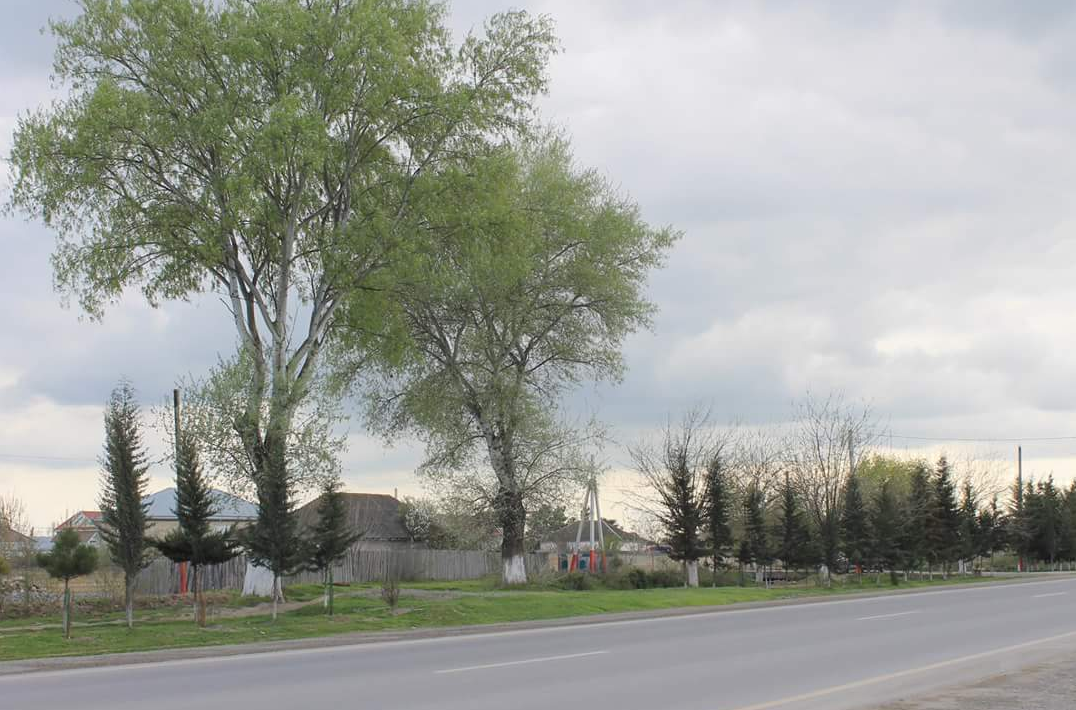 Qalaqayın.Qovaq ağacı